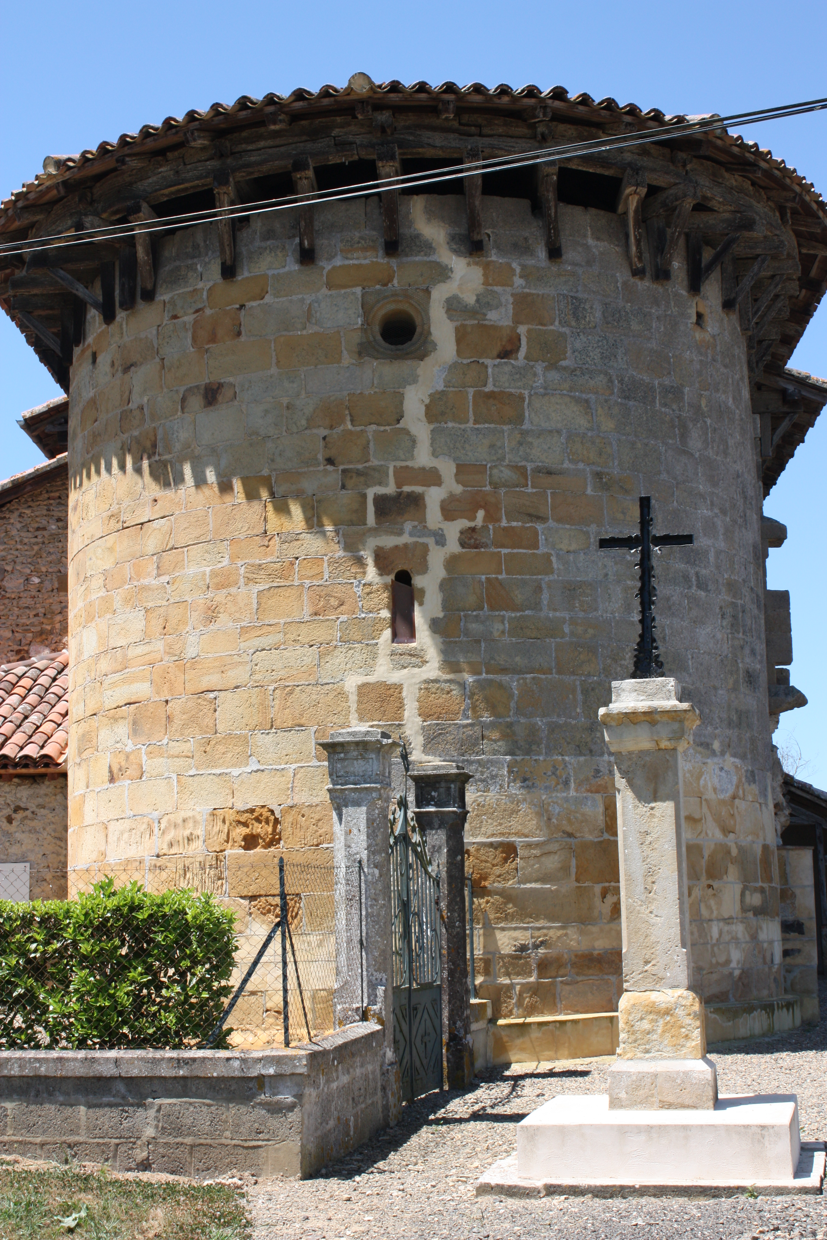 Luppé-Violles - Eglise Saint-Barthélemy de Violles